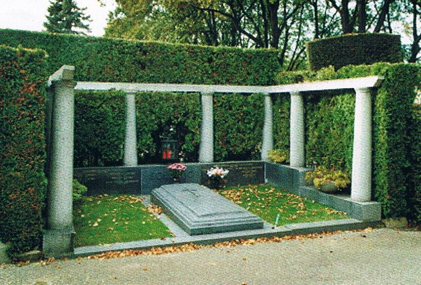 Friedhof Hietzing-Karl Hartl